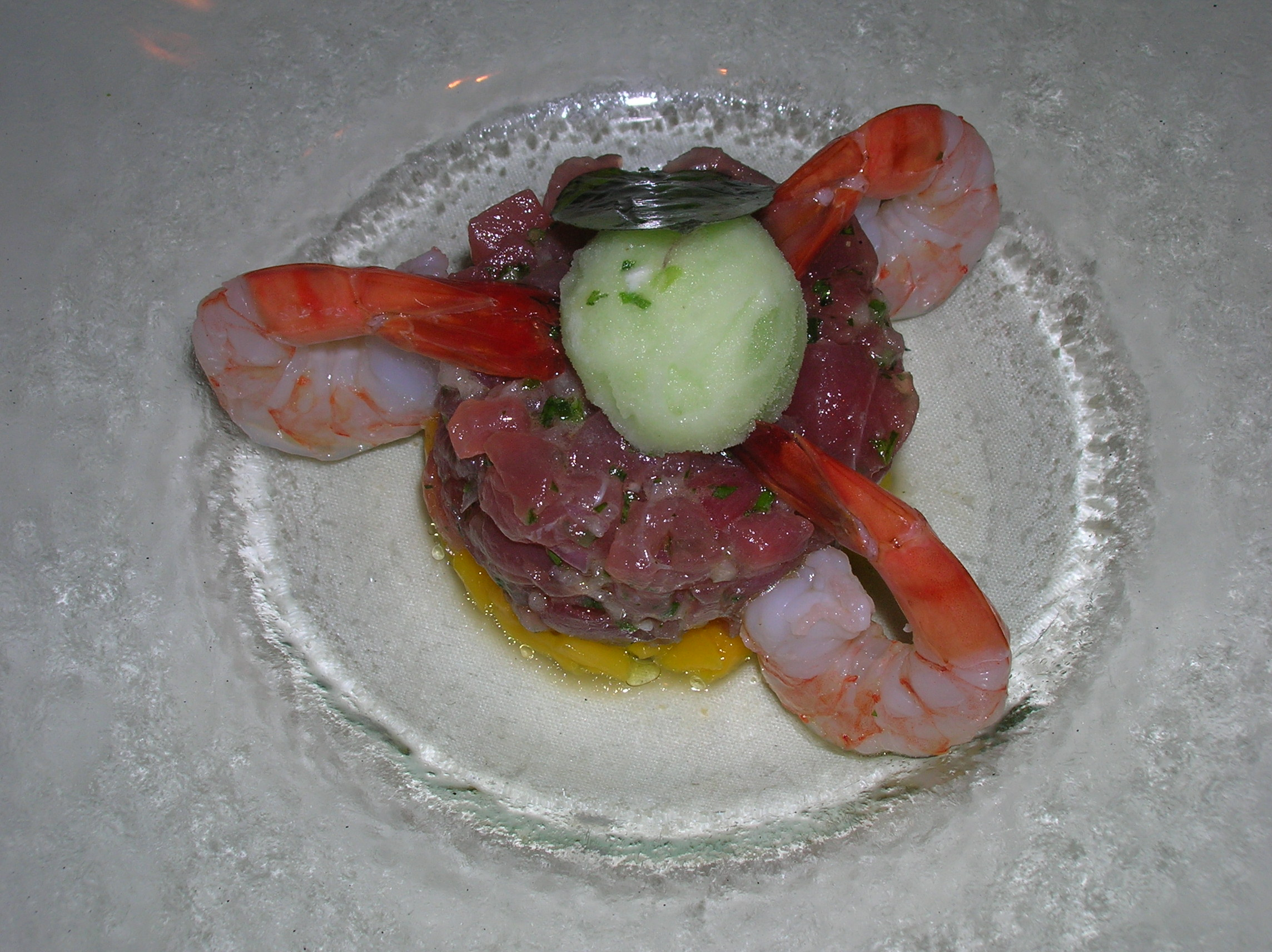 Tartar Tuna in Chloelys